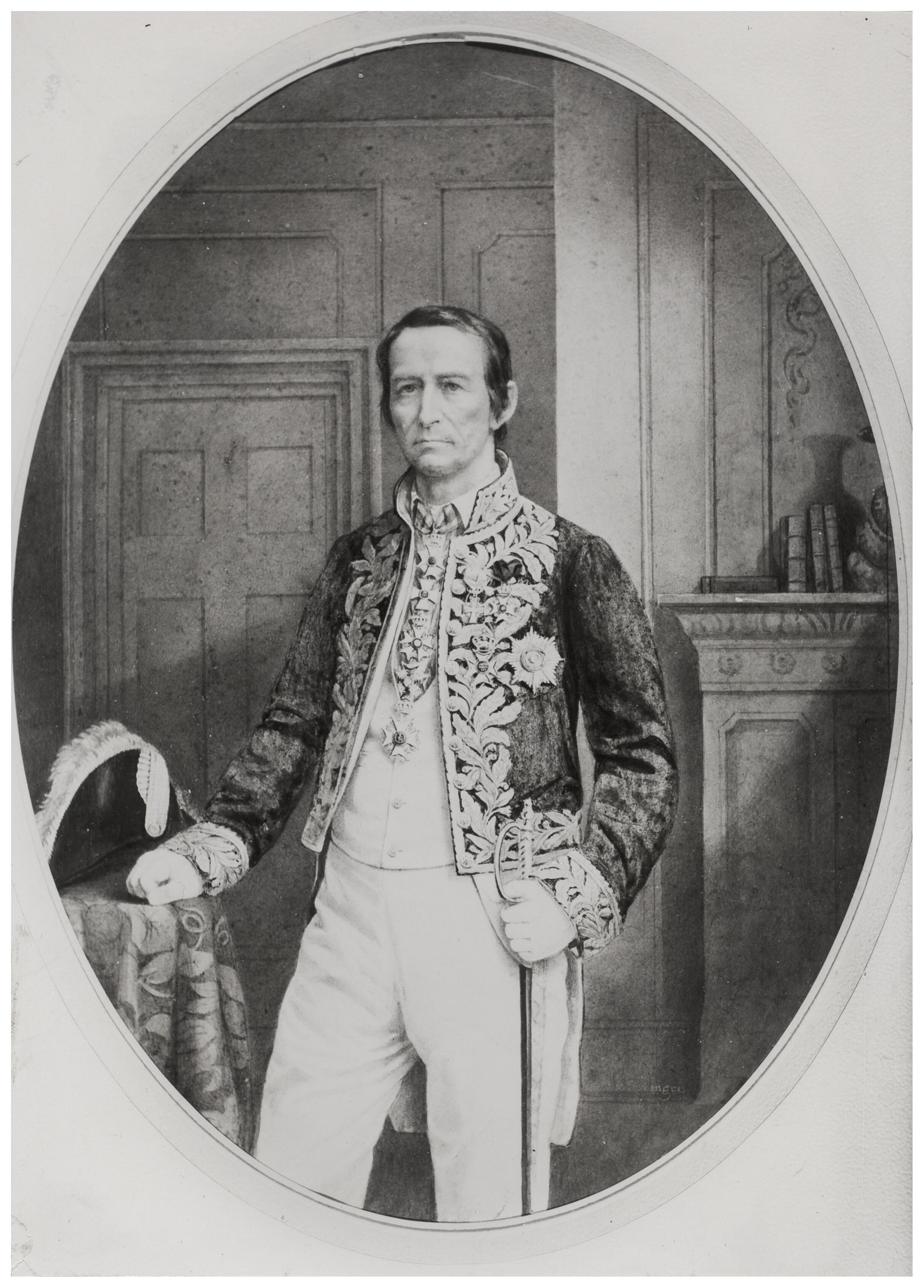 Portret van Reinhard Frans Cornelis van Lansberge (1804-1873)